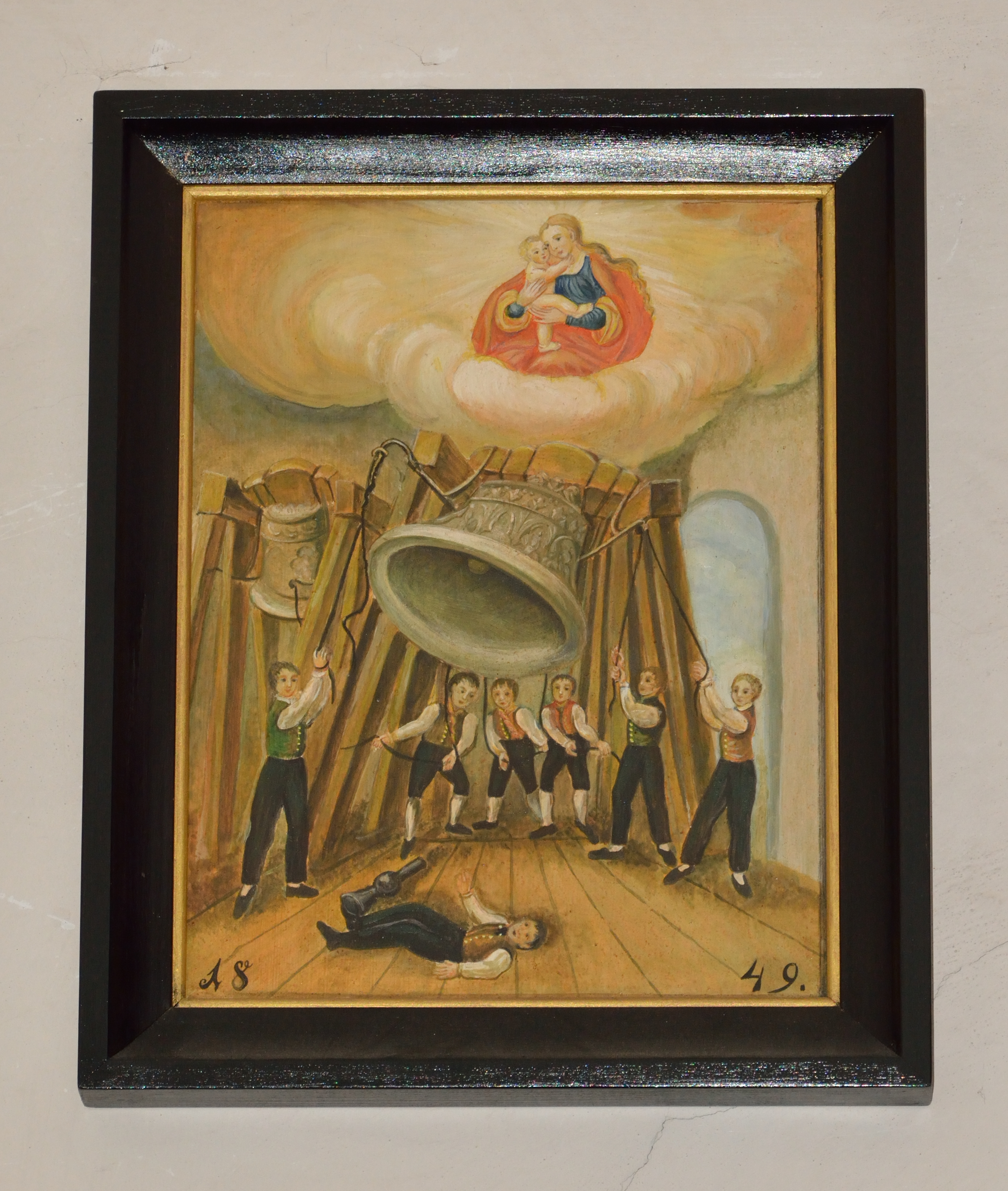 Votivbild in der Liebfrauenkirche Kitzbühel. Dargestellt ist ein Unfall durch Klöppelbruch der Kaiserglocke, die anhand ihres neugotischen Zierrats erkennbar ist. Datiert ist das Votivbild mit 1849. Der Unfall hat sich also etwa zwei Jahre, nachdem die Glocke nach Kitzbühel kam, ereignet.